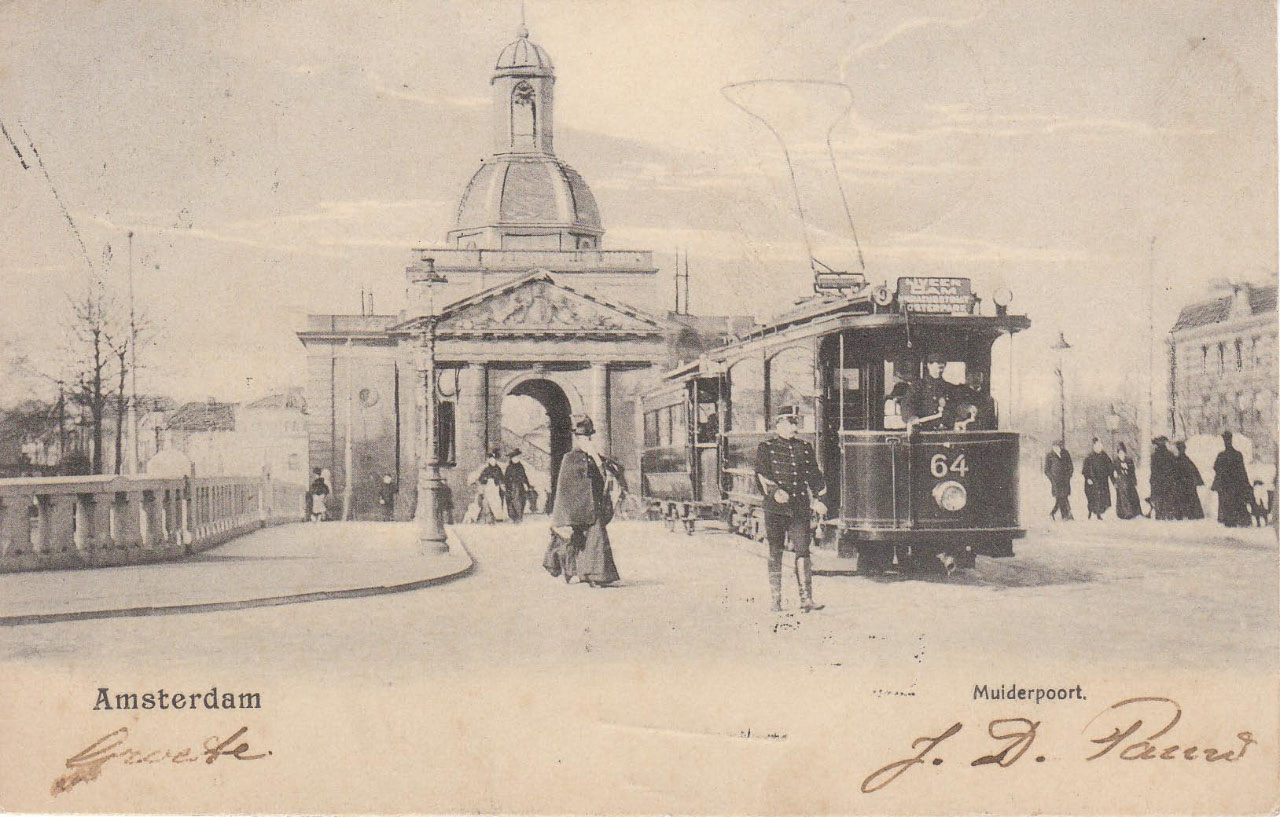 Muiderpoort met tram, ~1905.